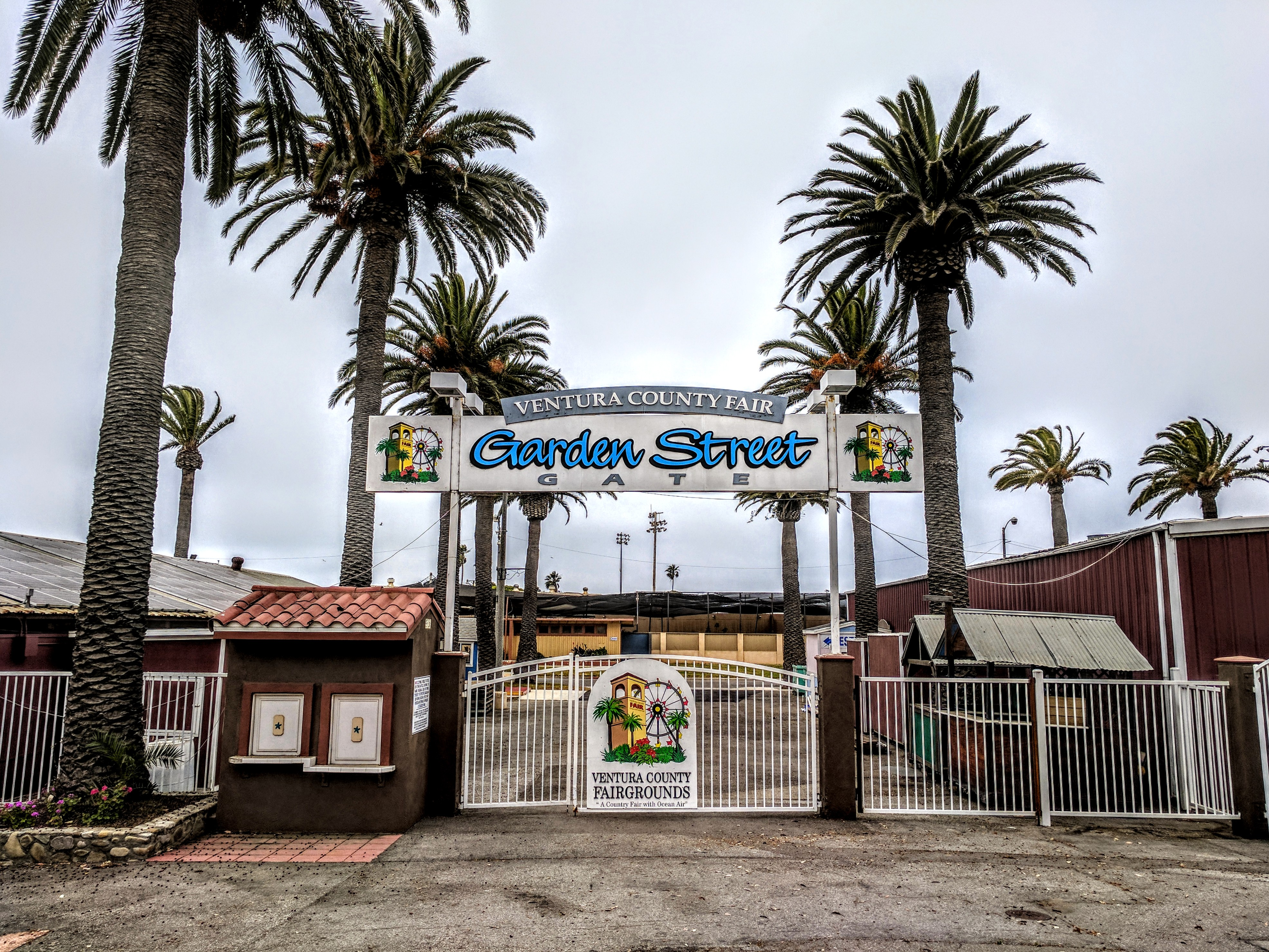 Garden Street gate